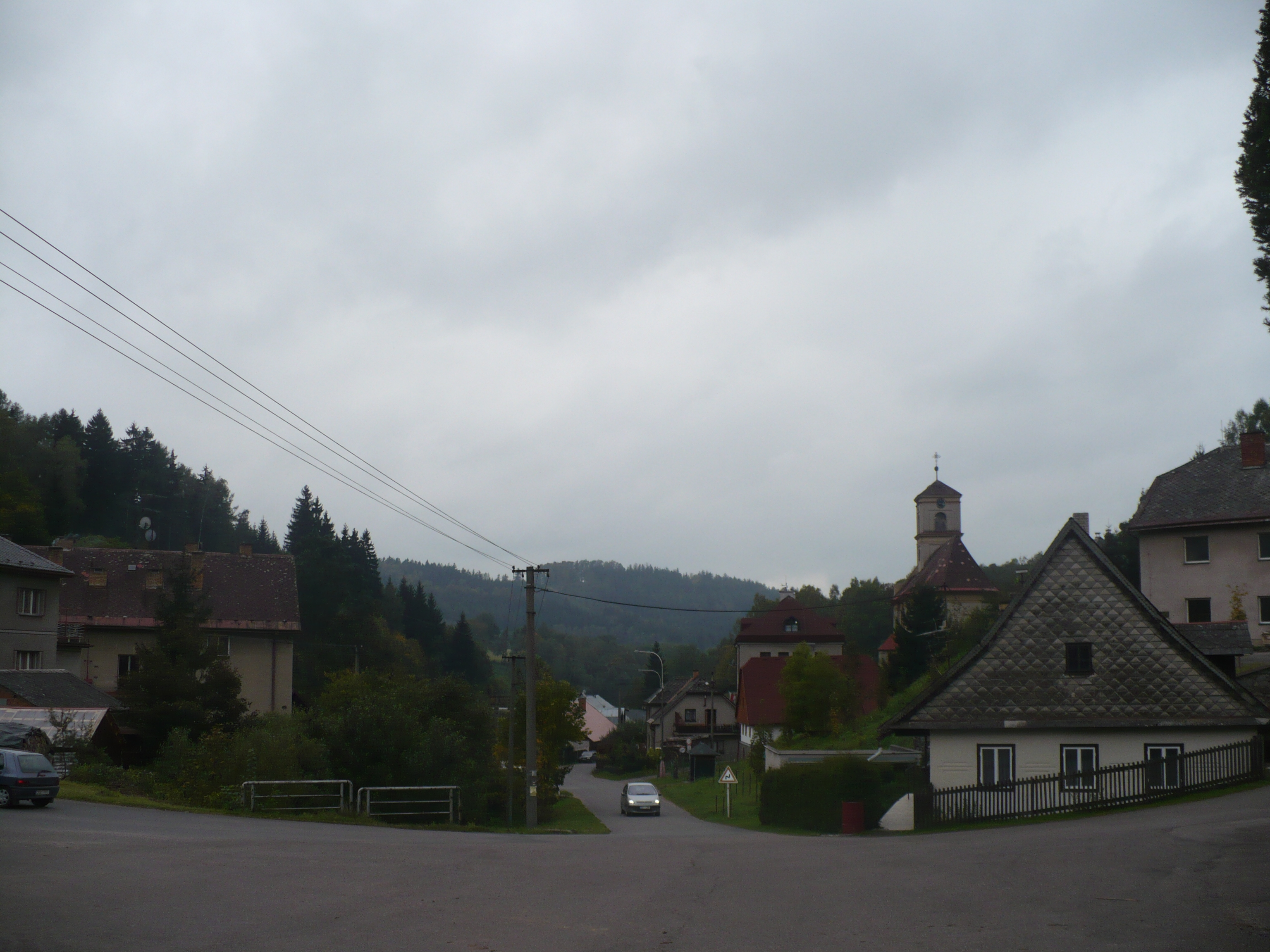 Orličky-náves